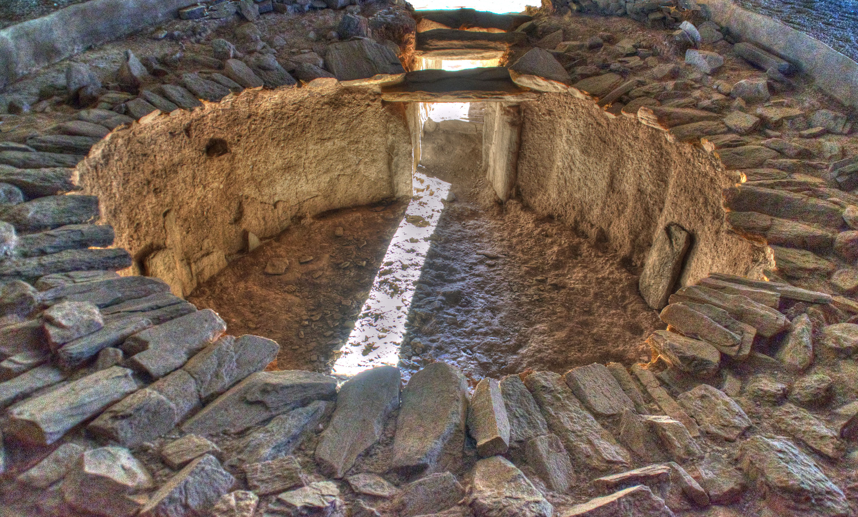 La tumba de Huerta Montero está en Almendralejo, Badajoz, y tiene una antigüedad de 4600 años (Edad del Bronce). Alrededor del solsticio de invierno, el Sol se alinea con el corredor de entrada e ilumina el interior durante unos minutos, circunstancia que se aprecia en la foto, tomada el 30 de diciembre de 2014 a las 10:15 de la mañana. La iluminación cálida del interior de la cámara es natural, por reflejo del haz de luz solar, el conjunto está bajo cubierta.